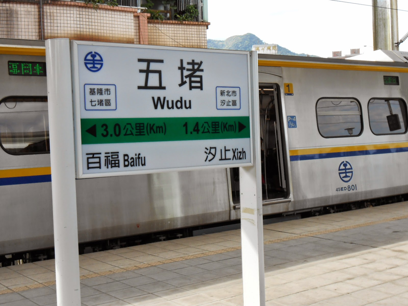 臺灣鐵路管理局五堵車站月台的相鄰車站里程告示牌與停靠的EMU801電聯車。